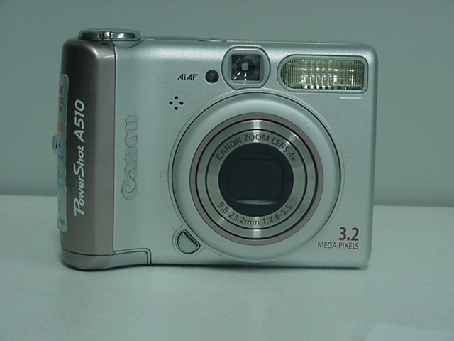 Appareil photographique numérique Canon PowerShot A510